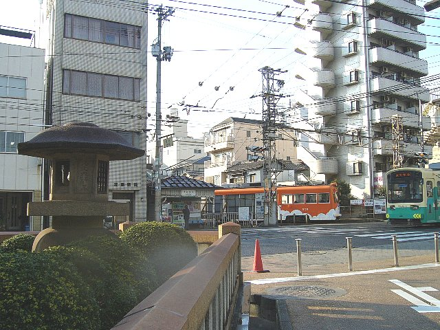 阪堺電気軌道上町線・阪堺線 住吉停留場 阪堺線浜寺駅前行き（右）と上町線天王寺駅前行き 中央に2番線待合所が見える 手前はja:住吉大社